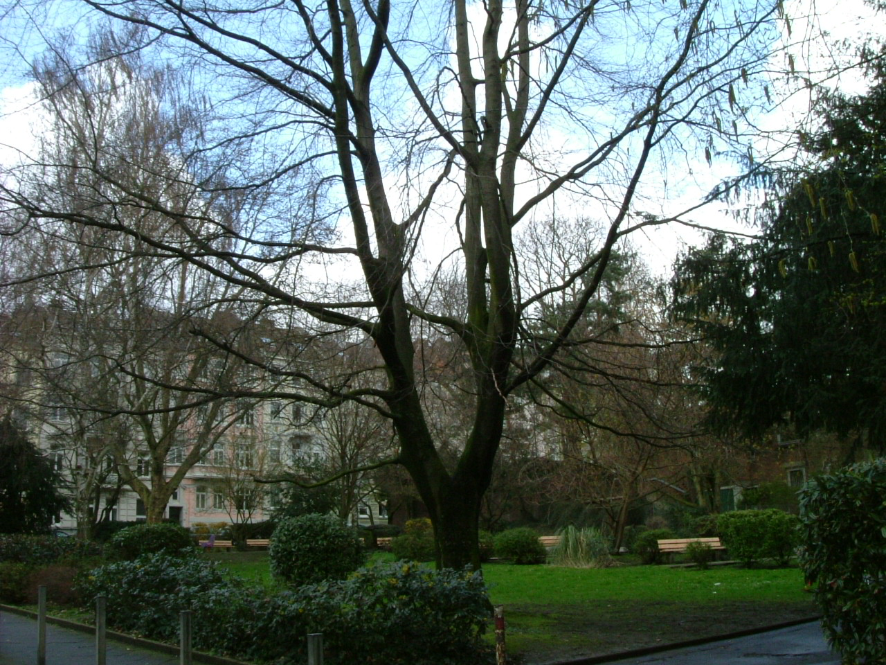 Aachen, Teilansicht Sandkaulpark